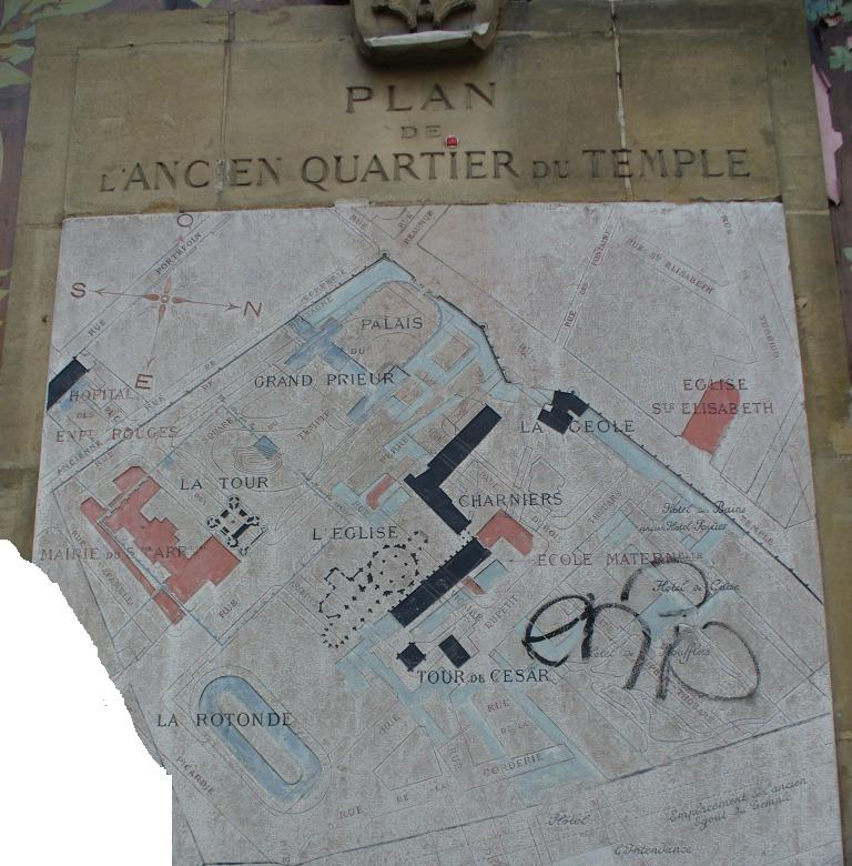 Plan de l'ancien quartier du temple, Paris IIIe arrondissement, figurant l'ancien enclos du Temple avec l'emplacement de la Tour de César et du Palais du Grand Prieur au temple. Rue Gabriel Vicaire, Paris.